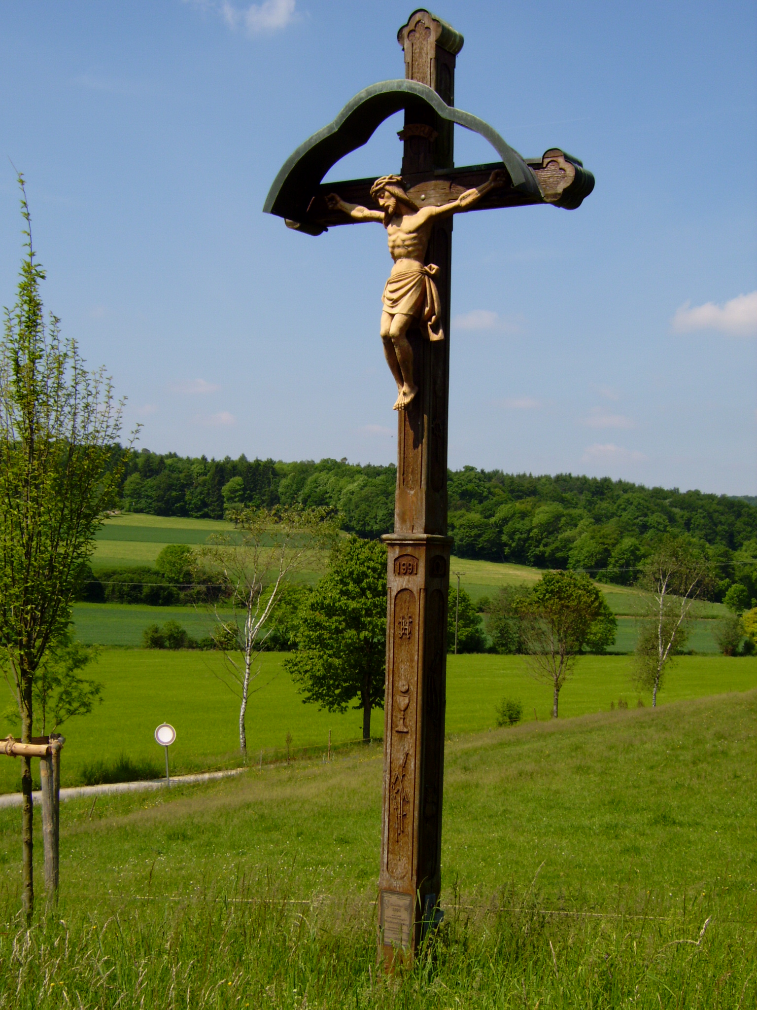 D 89584 Erbstetten: Feldkreuz der Flurbereinigung 1991 Westlich der Kreisstraße K 7337 Erbstetten – Unterwilzingen bei km 2,55, an der Abzweigung des Radwanderweges ins LautertalGPS: 48°16.156 N, 9°32.576 O